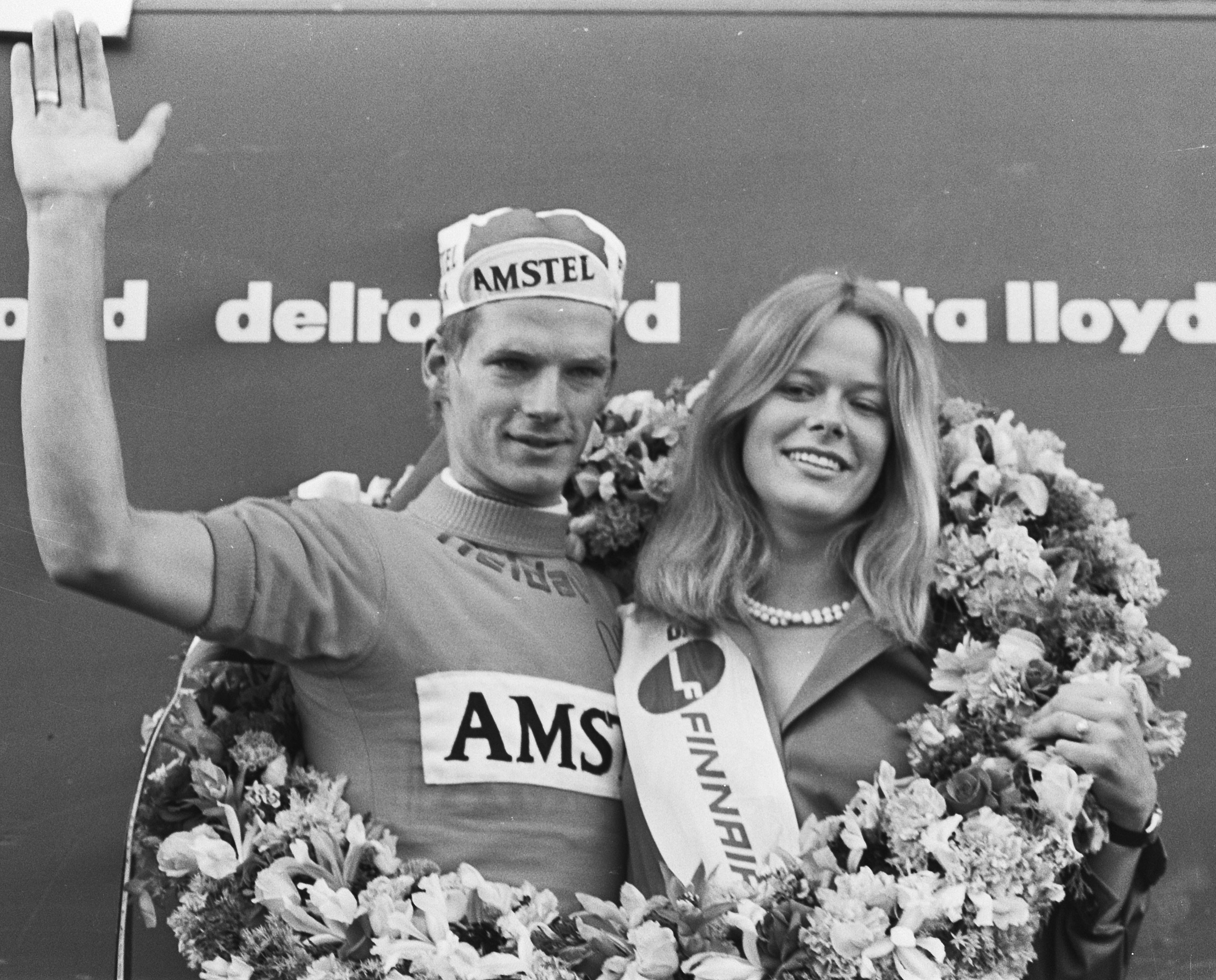 Leo van Vliet lors de sa victoire à l'Olympia's Tour 1976.